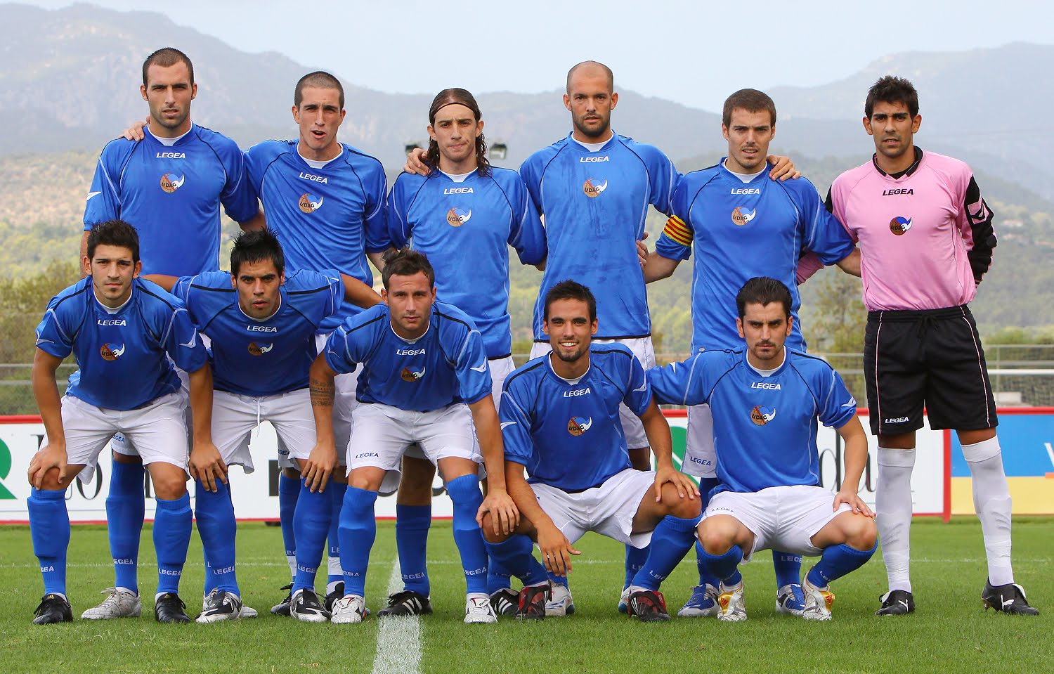 Unión Deportiva Atlética Gramanet